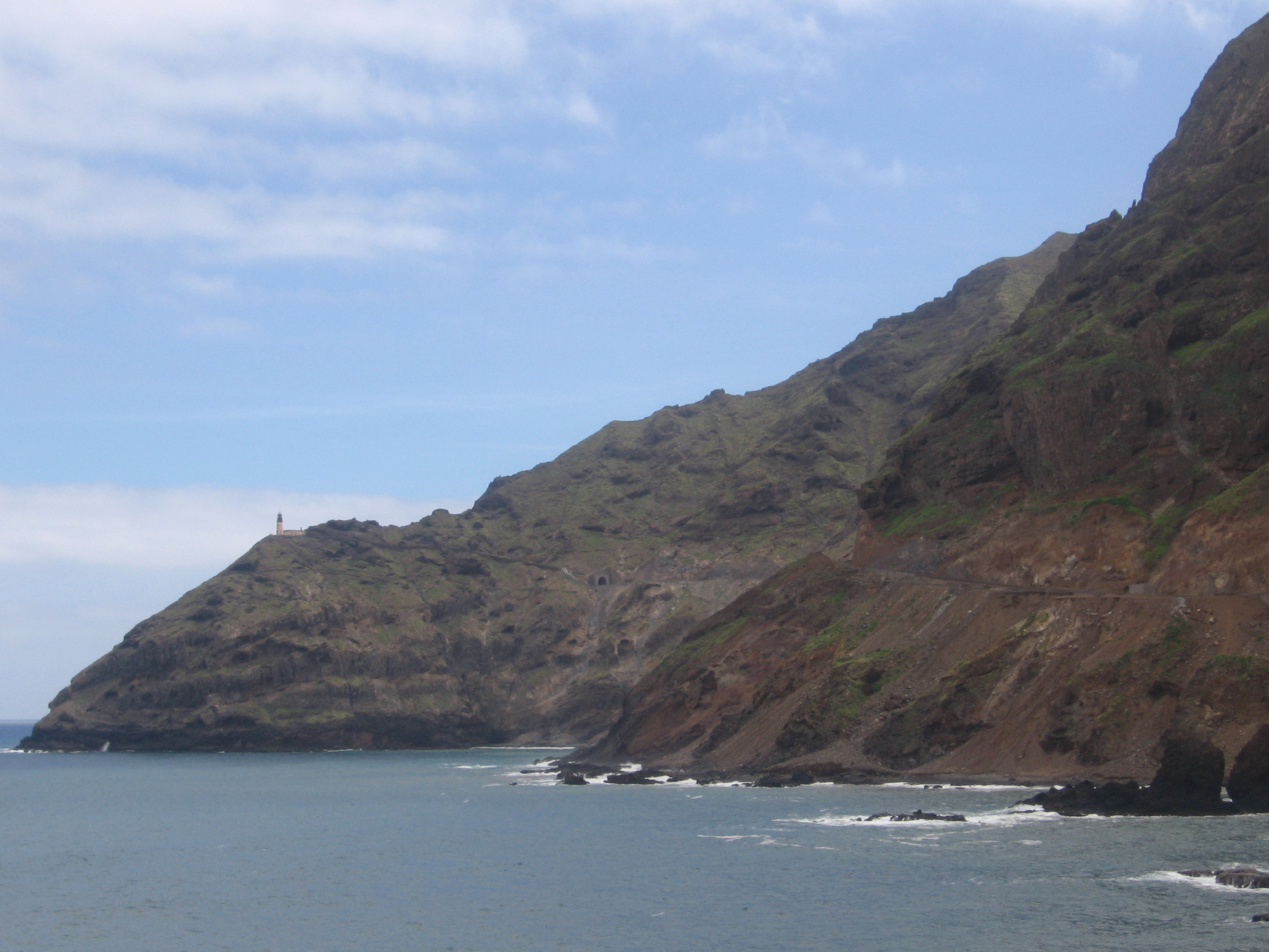 Farol Fontes Pereira de Melo, Pontinha da Janela, Paul, Santo Antão, Cabo Verde